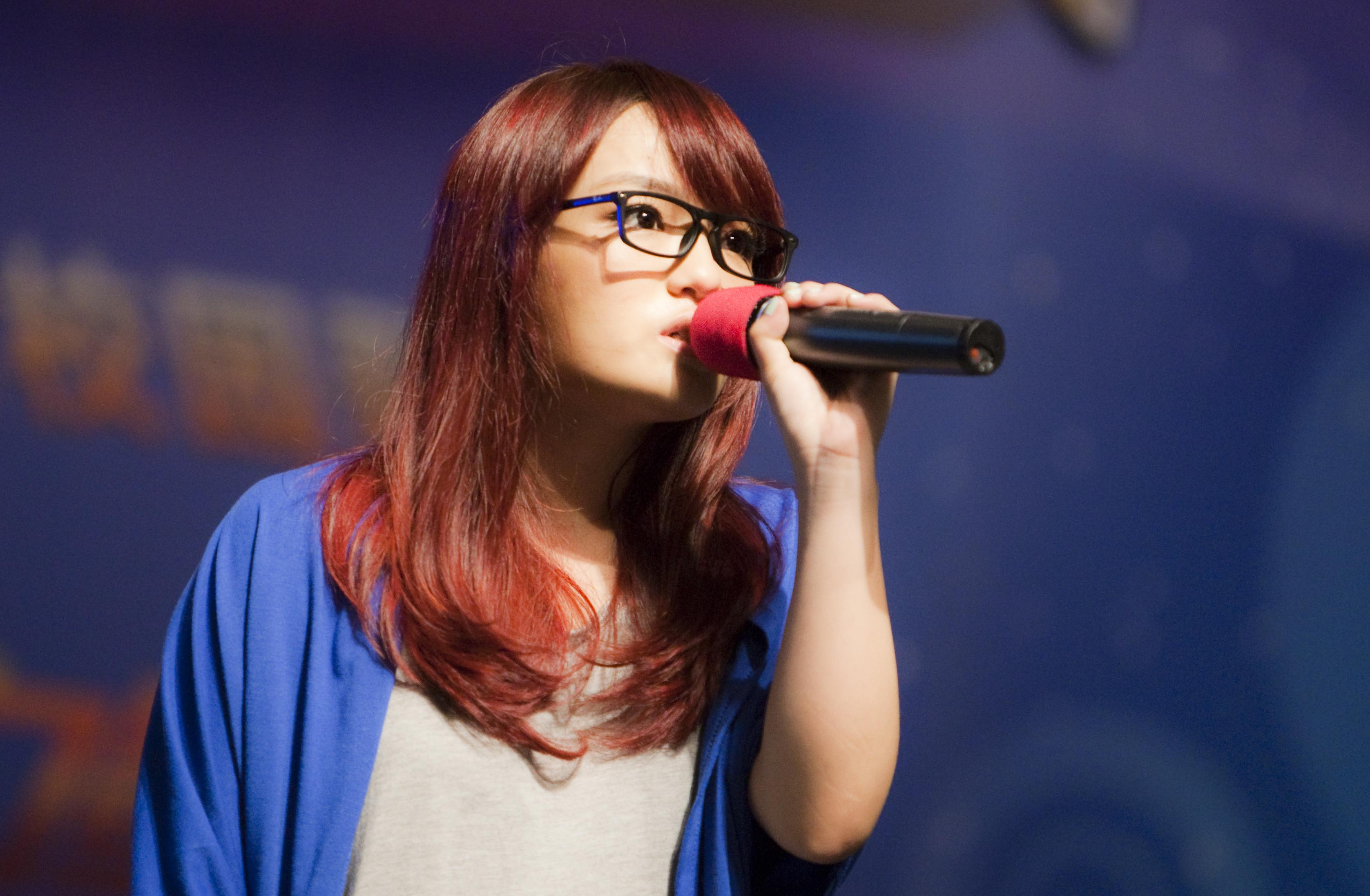 20110927 杭州搜狐音樂會-徐佳瑩-彩排